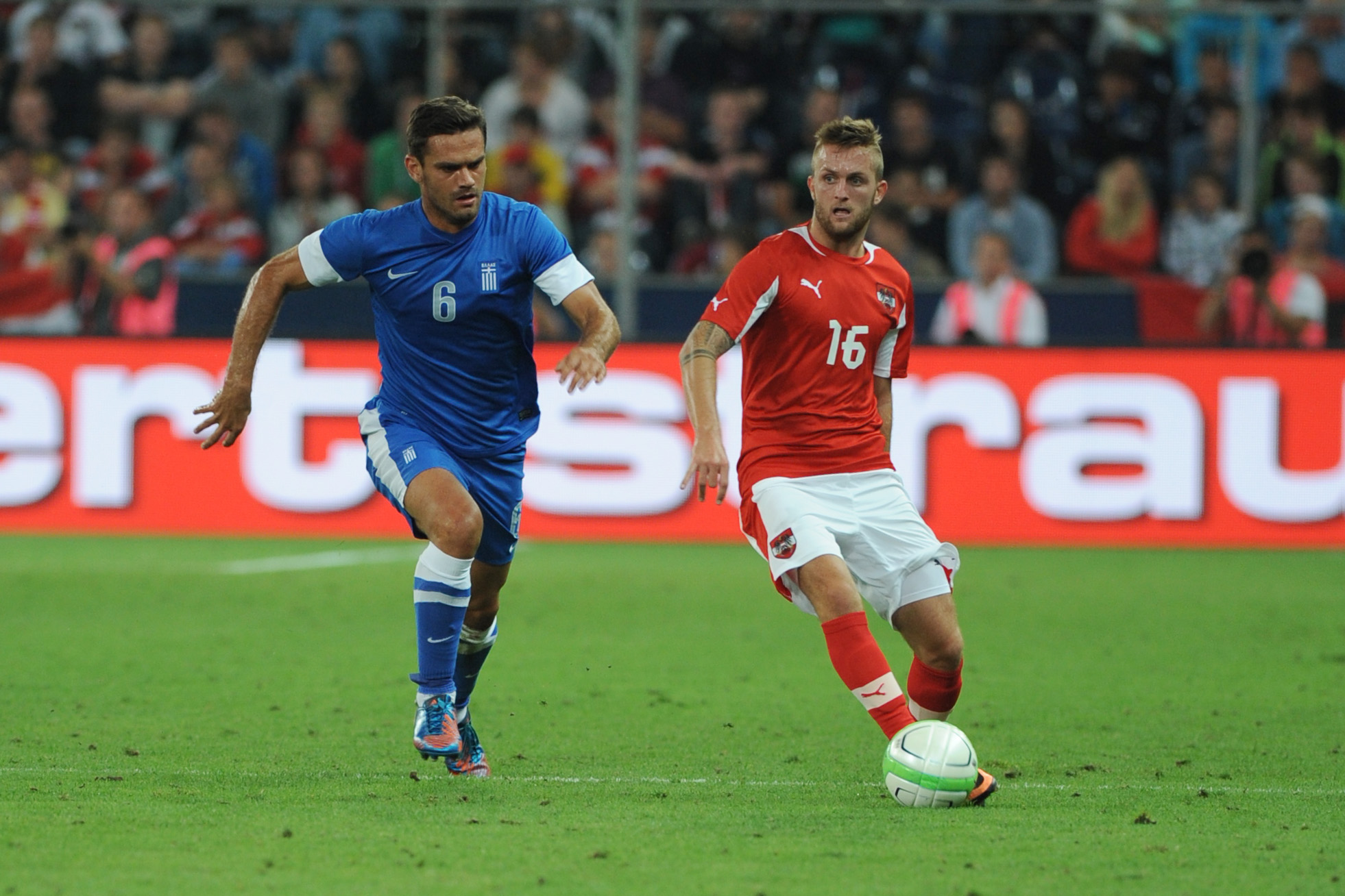 Freundschaftliches Länderspiel Österreich - Griechenland am 14. August 2013 in Salzburg: Alexandros Tziolis, Jakob Jantscher